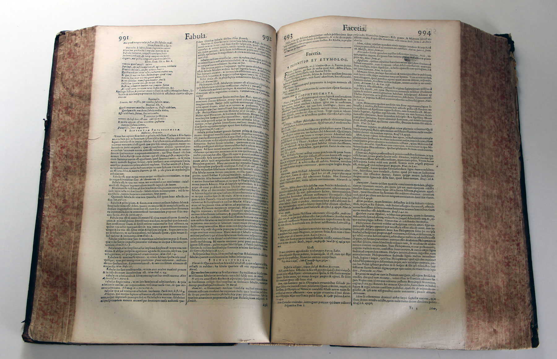 Polyanthea, Lyon 1659. Exemple de gros in-folio. (poids: 4,5 k)